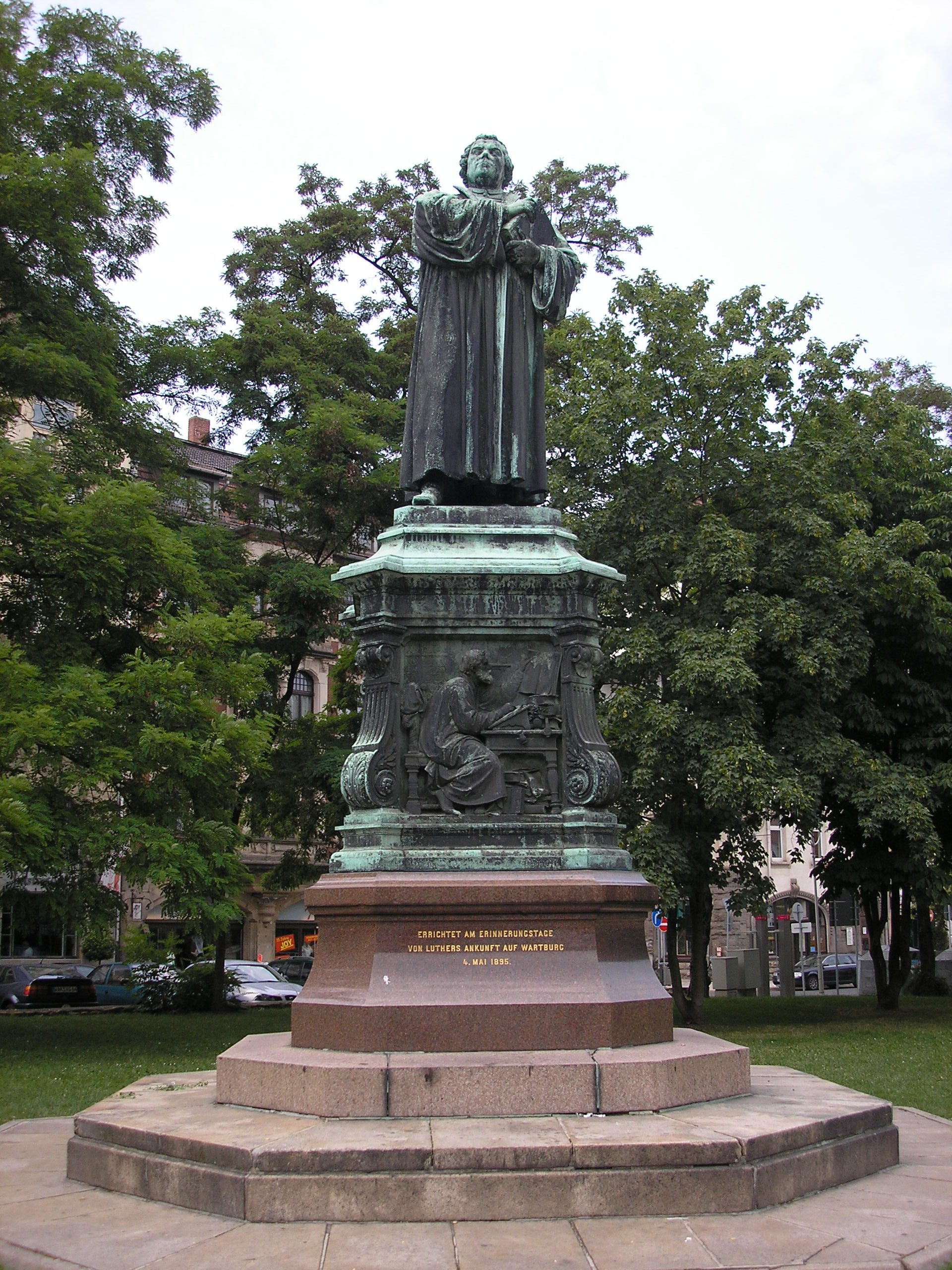 Das Lutherdenkmal in Eisenach von Adolf von Donndorf